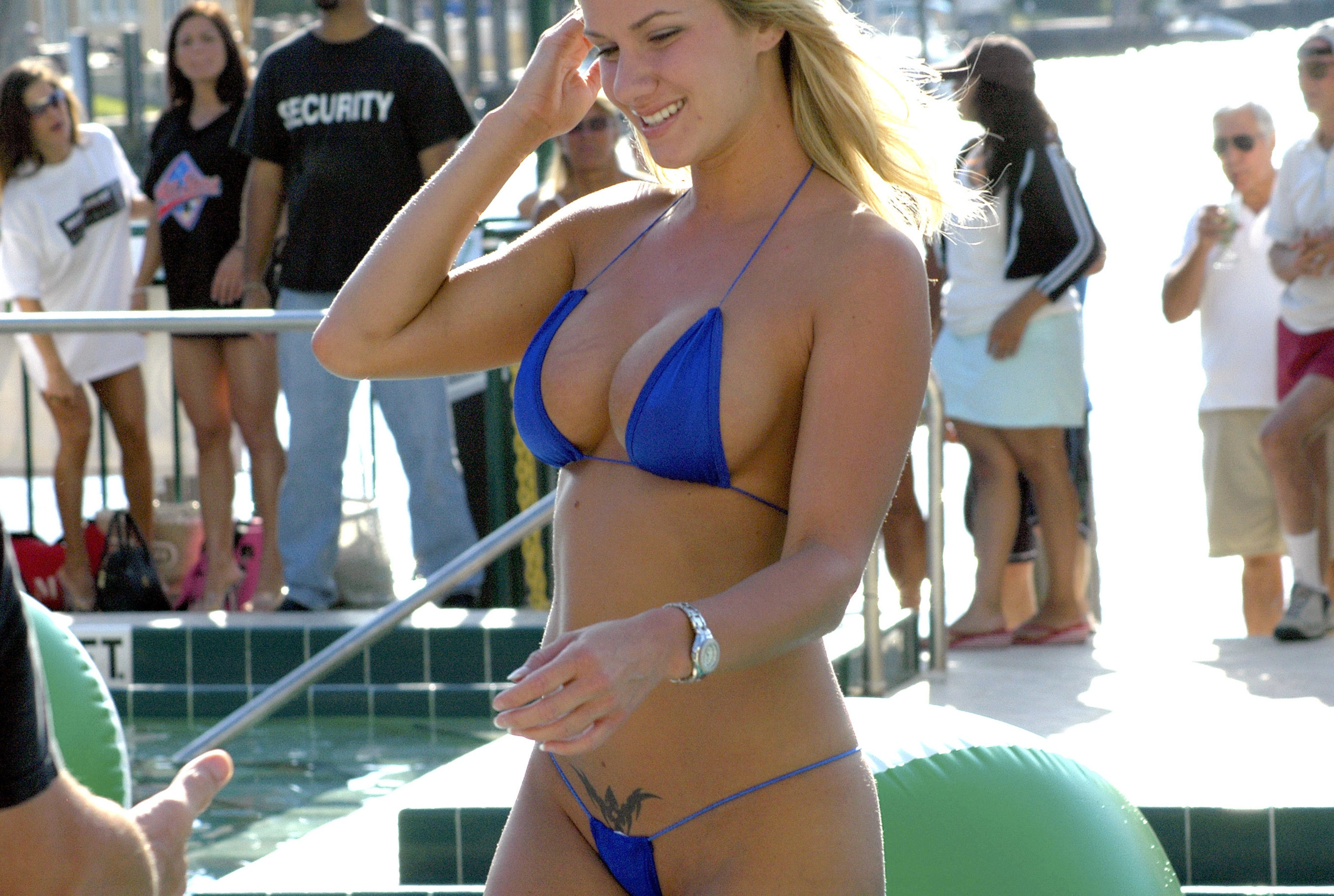 Bikini Girl